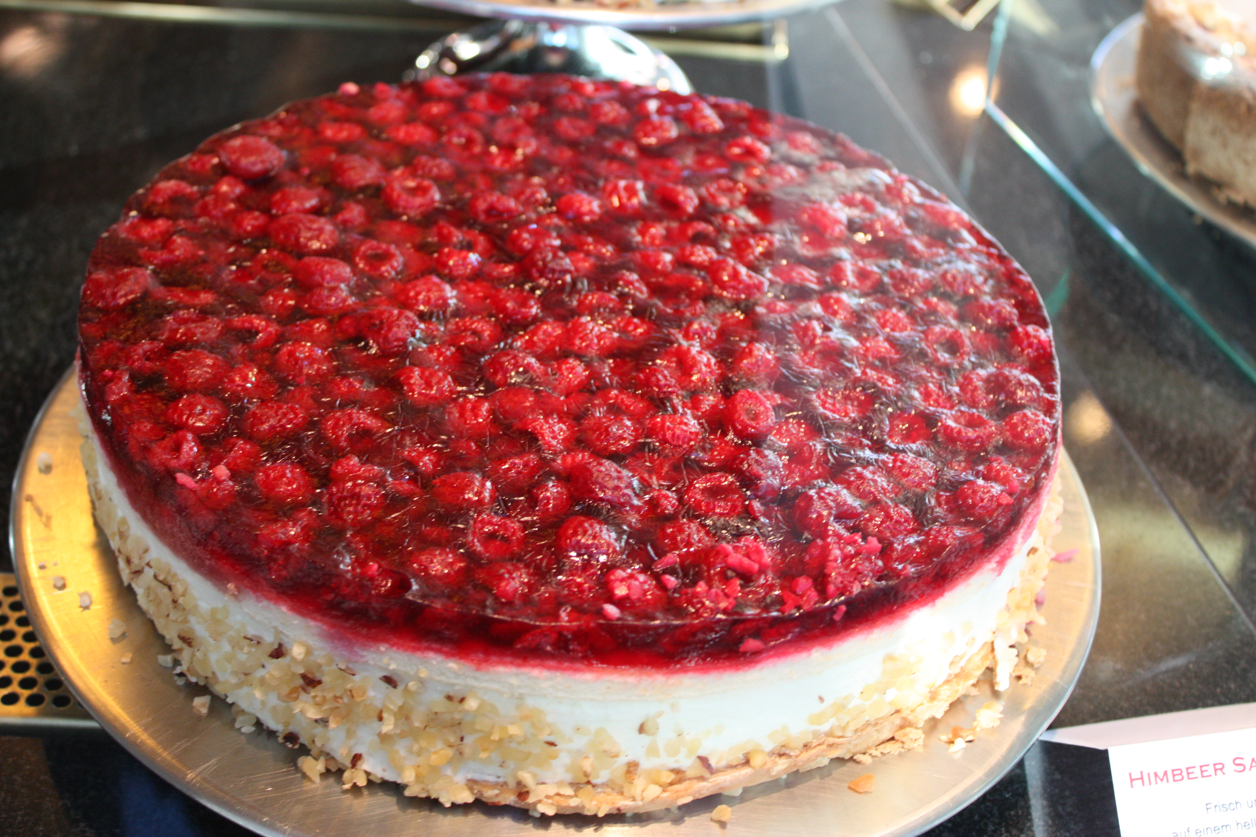 Köln, März 2009; Himbeertorte im Schokoladenmuseum Köln